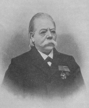 Medizinalrat Theodor Lachmann, Überlingen (1835-1918)